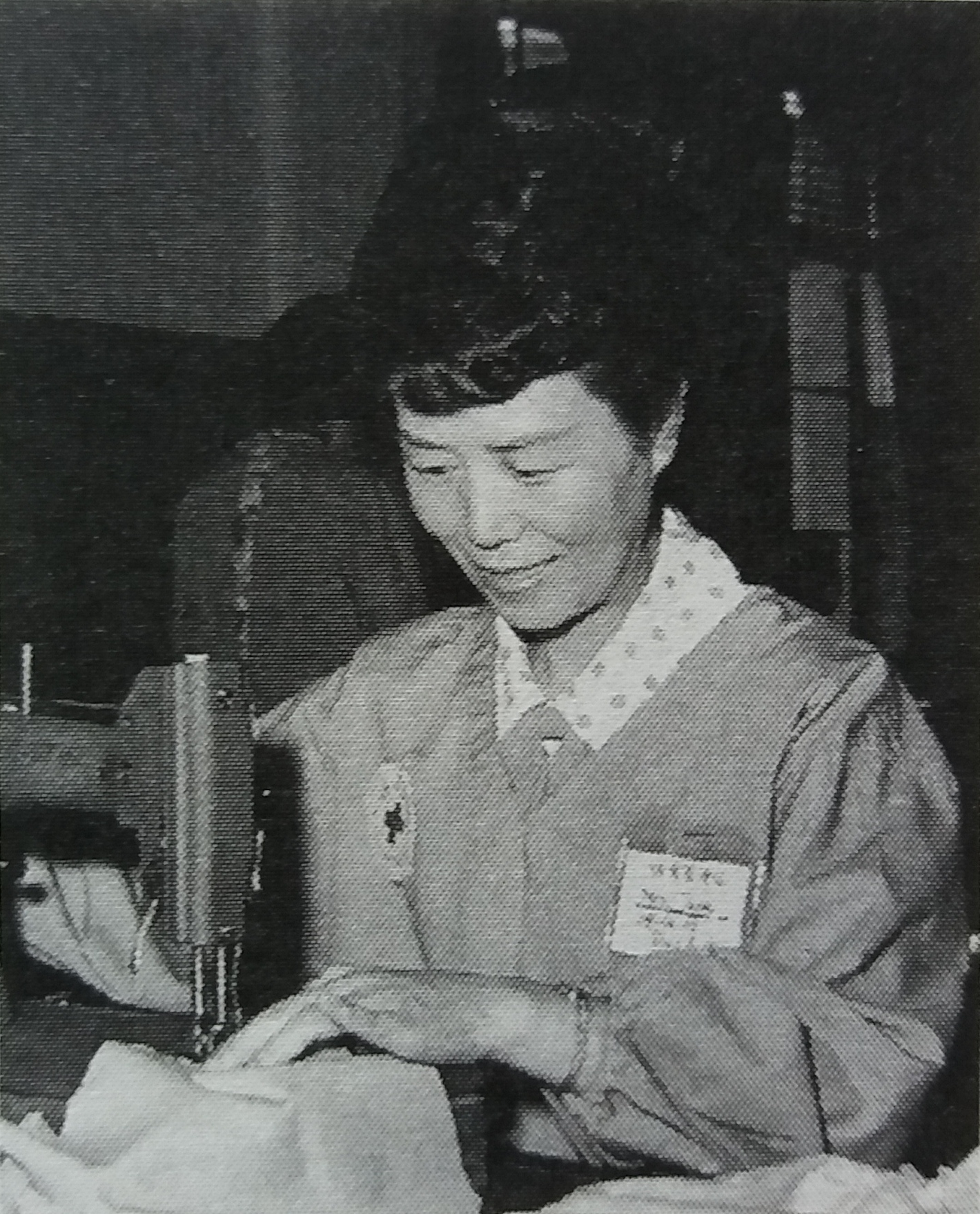 陆英修参加红十字缝纫志愿者活动